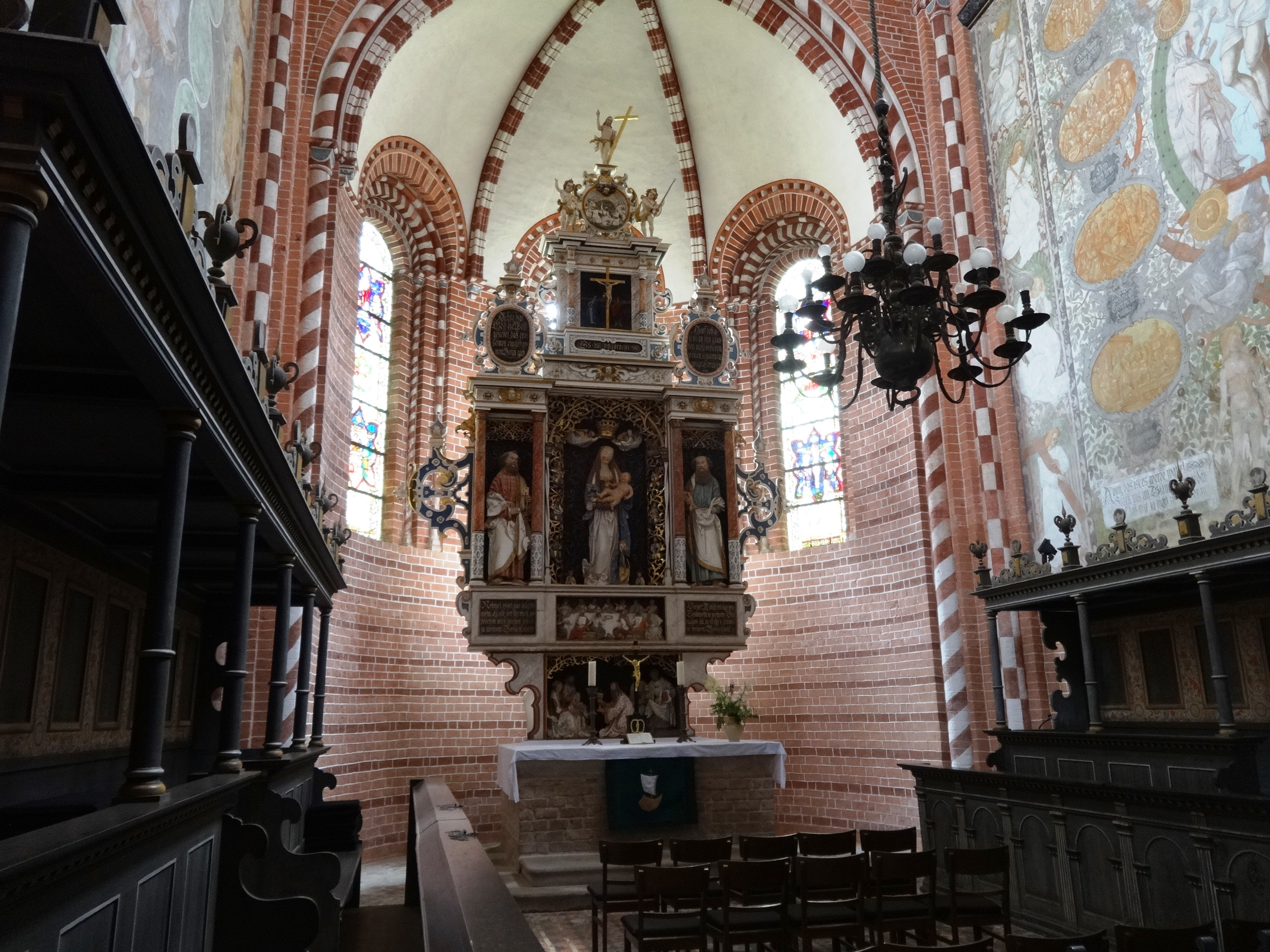 Die Klosterkirche in Doberlug gilt als das älteste erhaltene Gotteshaus der Zisterzienser im Osten Deutschlands. Sie wurde zwischen 1184 und 1228 erbaut und nach der Reformation zu einer Schlosskirche umgebaut. Mitte des 19. Jahrhunderts wurde das Mobiliar wieder entfernt und unter der Leitung des Architekten Carl Weber in den Jahren 1905 bis 1909 umgebaut.